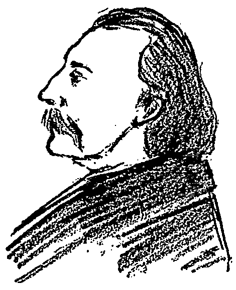 French poet Paul Napoléon Roinard (1856-1930) by Albert Brière